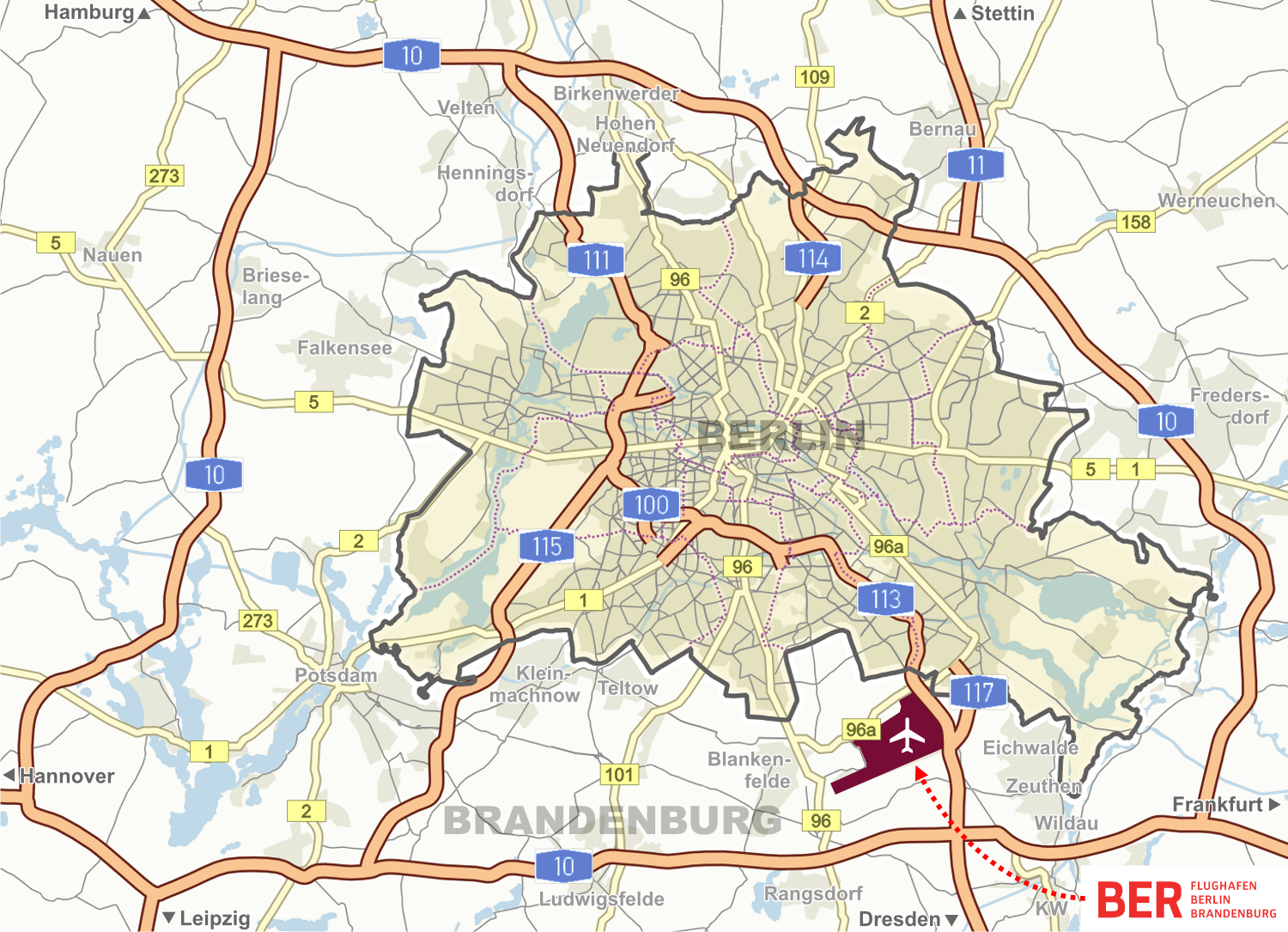 Berlin, Straßenverkehr Übersichtskarte, Flughafen Berlin Brandenburg